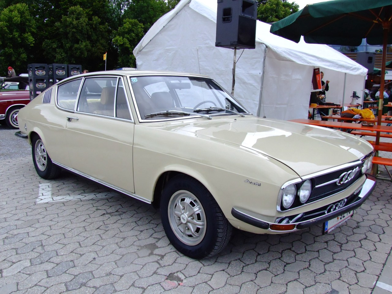 Quelle: selbst fotografiert, 07/2007 Fotograf: Späth Chr.